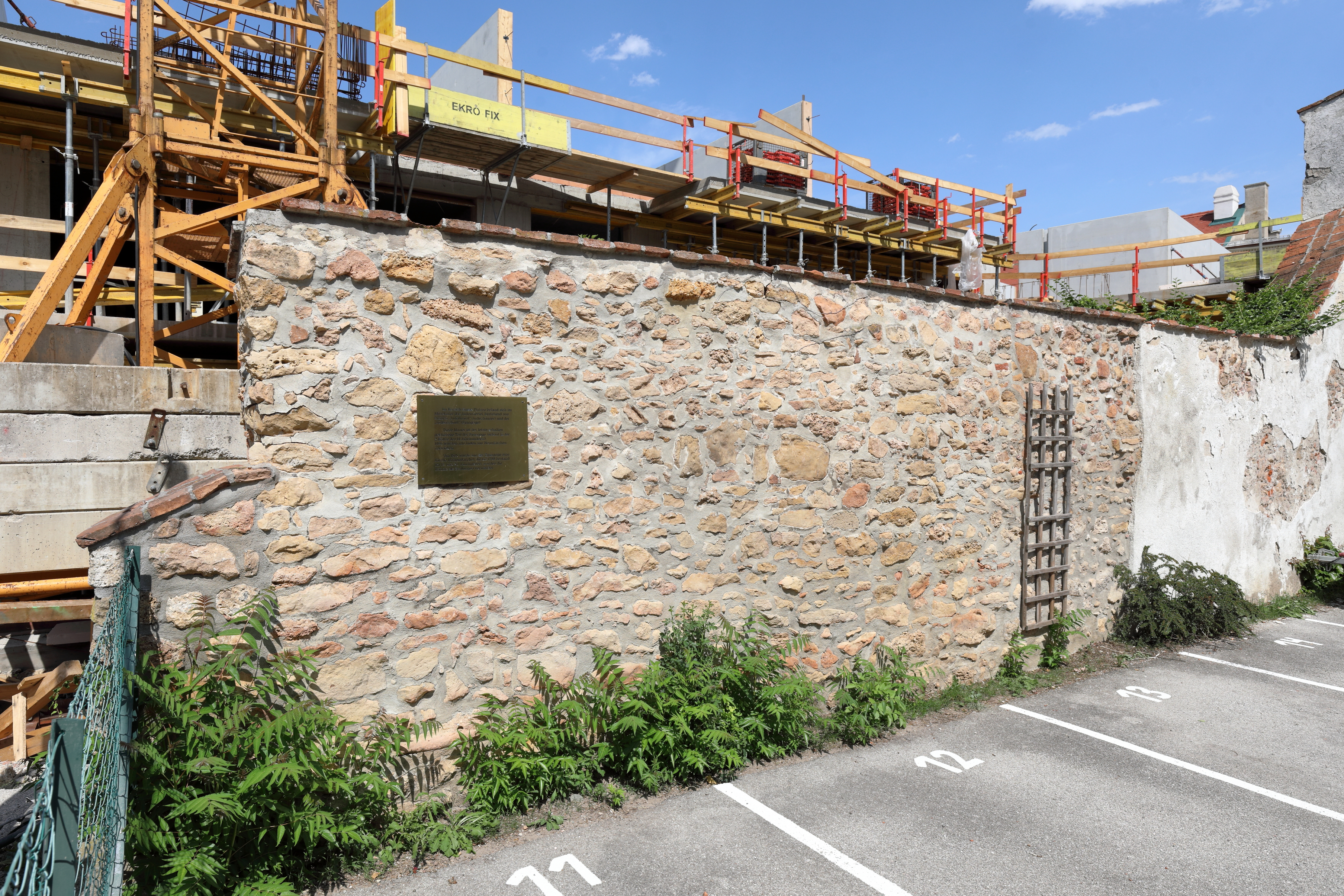 Bruchsteinmauer vom ehemaligen Judenviertel nächst Adresse Mühlgasse 2 in der niederösterreichischen Stadtgemeinde Neunkirchen.Die Bruchsteinmauer aus dem 14. Jahrhundert wurde bei Abbrucharbeiten im März 1998 entdeckt. Ursprünglich einer Synagoge zugeordnet, wird sie mittlerweile eher als Rest eines „Judenhauses“ interpretiert.